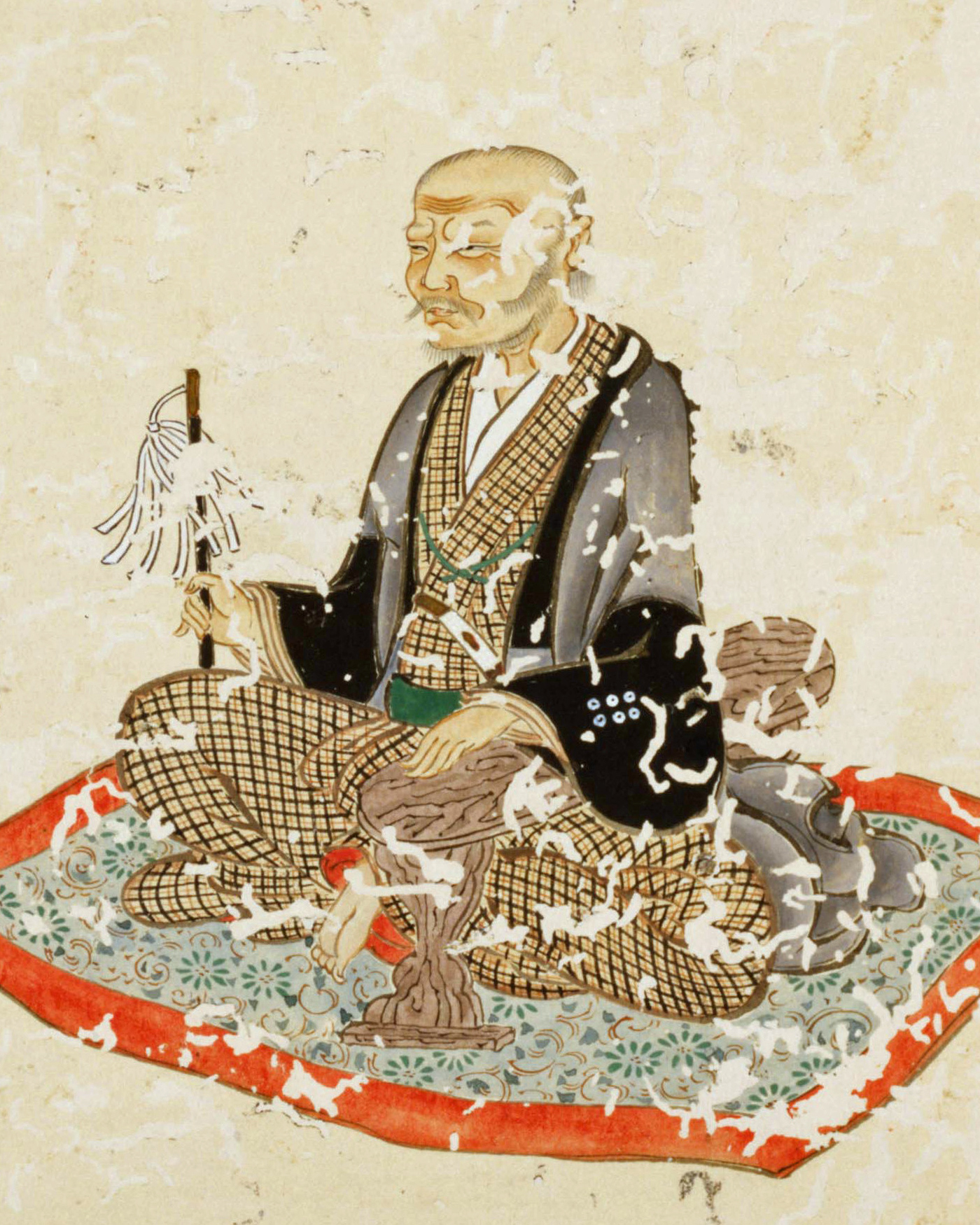 真田昌幸（武藤喜兵衛）像 真田幸正氏（1876-1917）所蔵